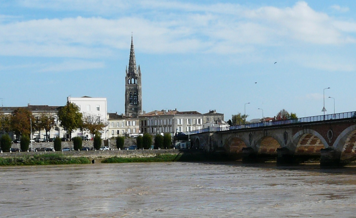 Libourne